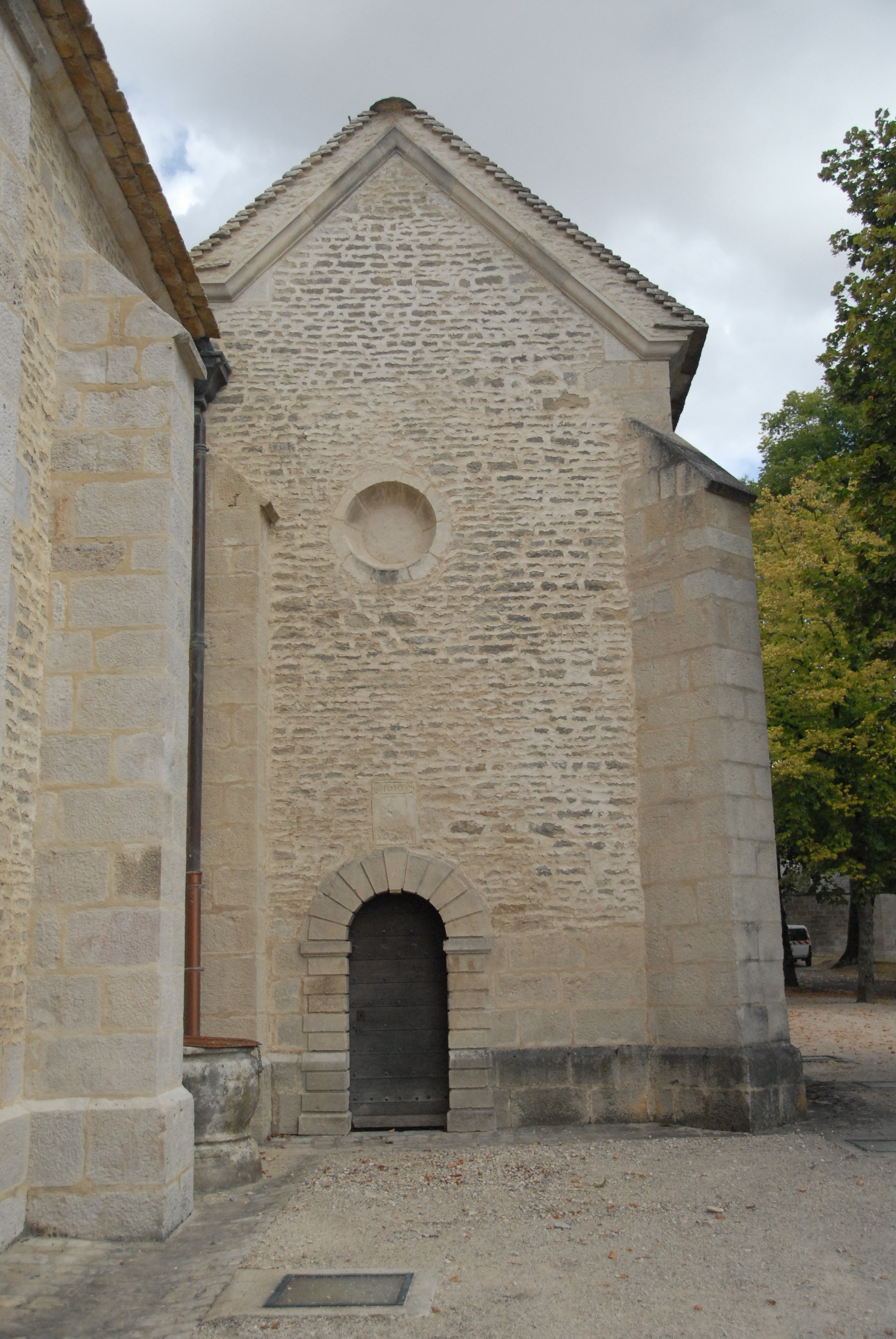 St-Vorles de Châtillon-s-S, Heiligkreuzkapelle von SW